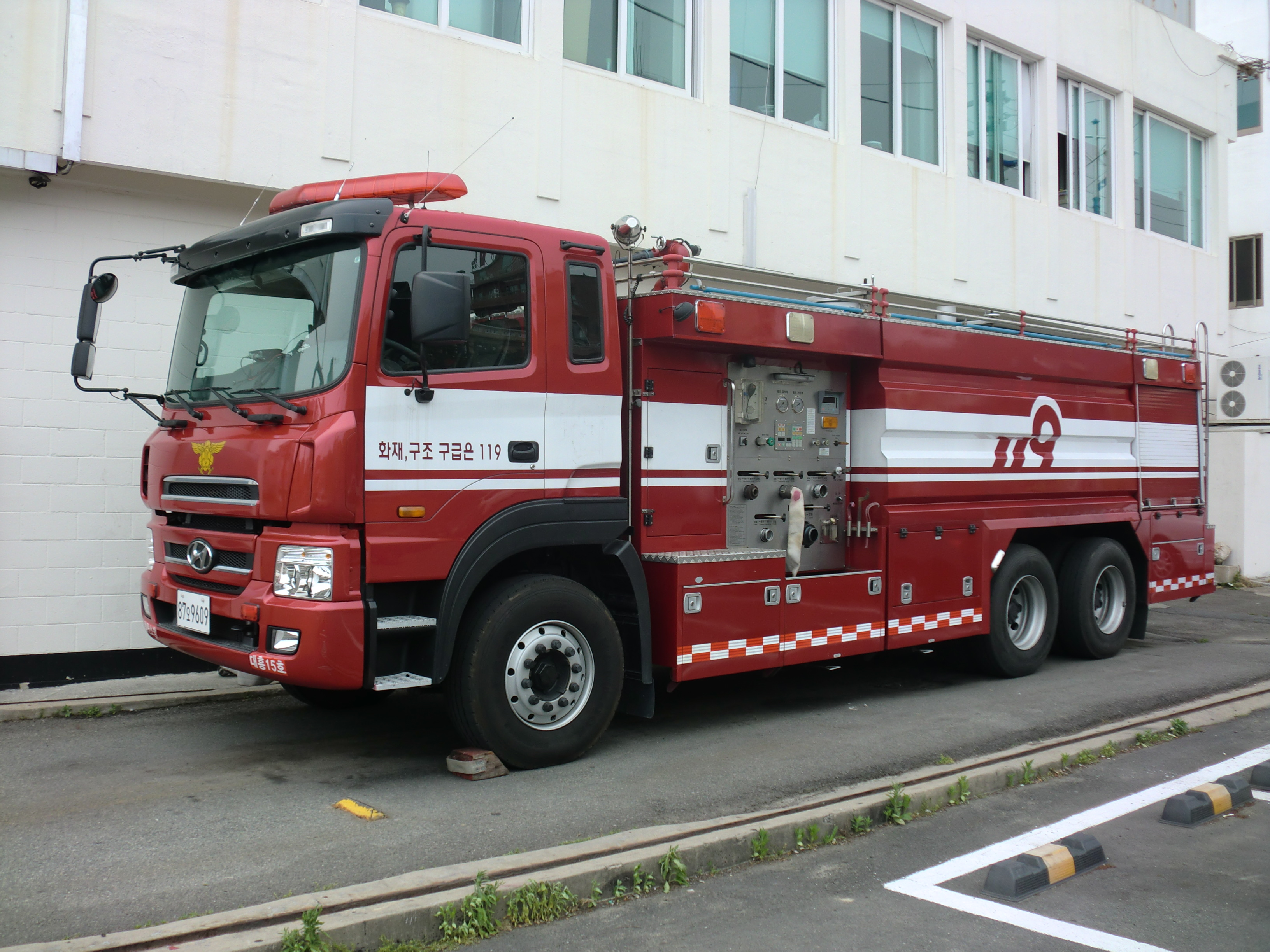 경상남도 창원시에 있는 창원소방본부의 소방차